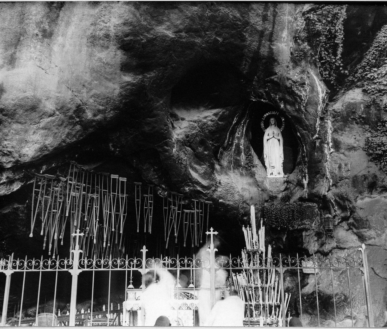 Béquilles suspendues sur un câble d'acier dans la grotte de Massabielle